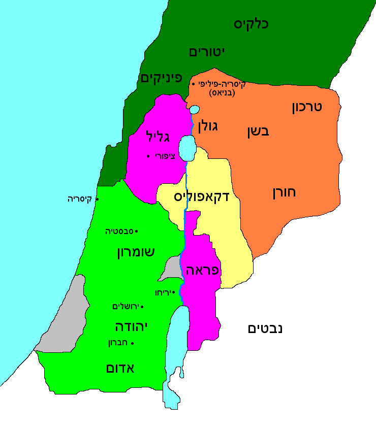 Palestine after Herod